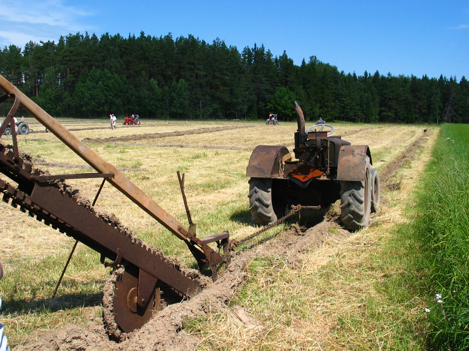 Traktorträff i Gestad, Dalsland